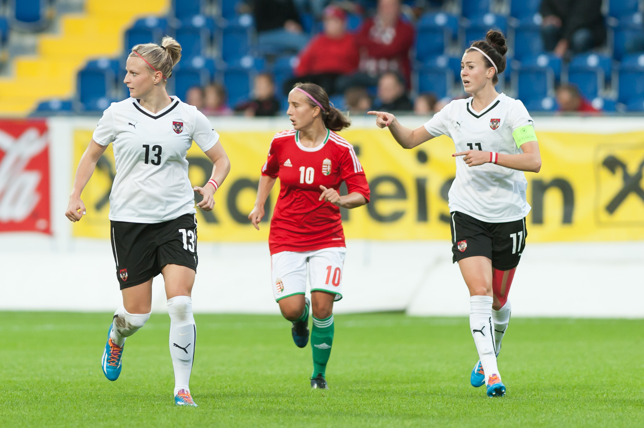 FIFA Women's World Cup 2015: Qualifying Round St. Pölten, 13.09.2014 Virgina Kirchberger, Viktoria Schnaderbeck, Fanny Vágó